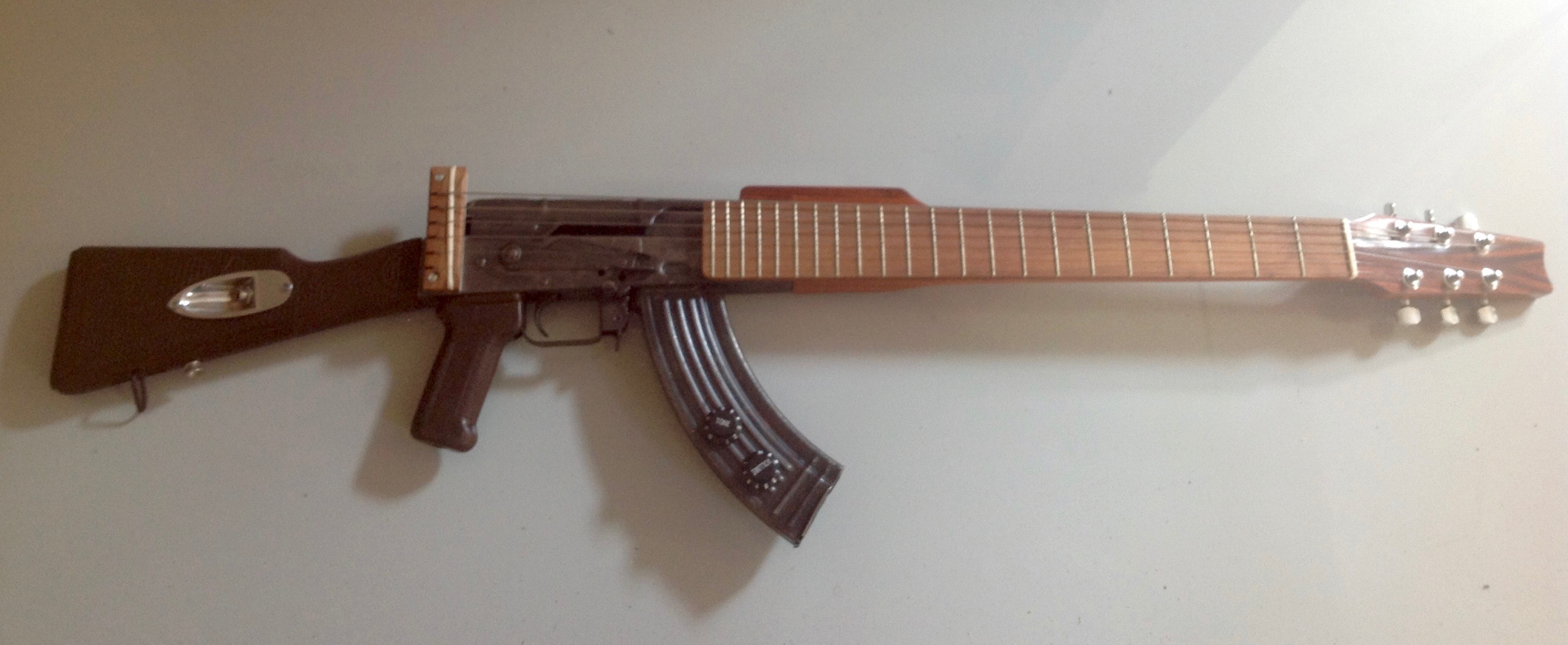 Pieza en exposición en el Museo de Antioquia, Medellín, Colombia. Esta fotografía fue tomada en el municipio colombiano con código 05001.